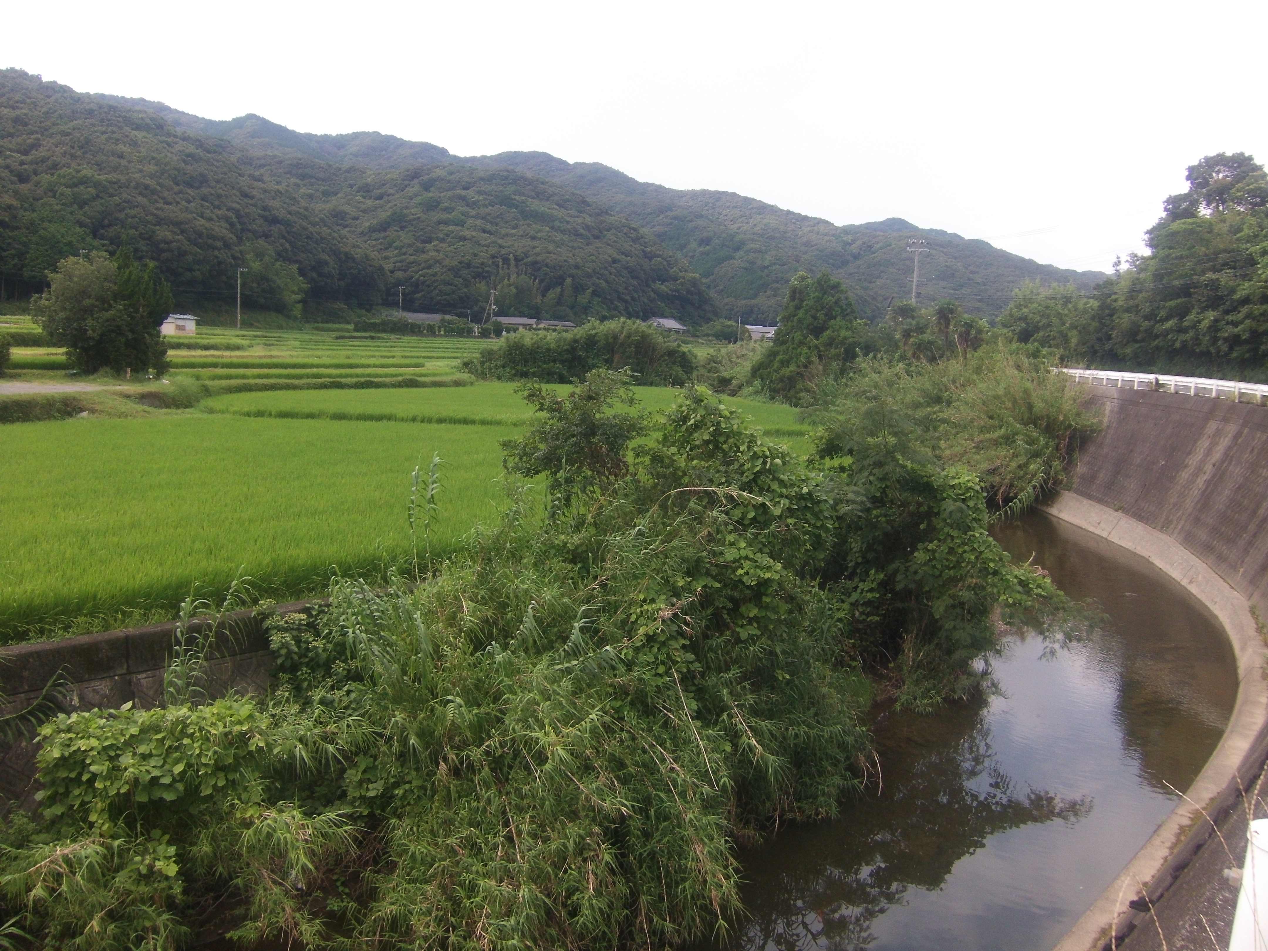 熊野古道・紀伊路が抜ける原谷集落の田園風景と西川